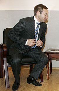 Alexei Kuzmitsky, Governor of Kamchatka Krai